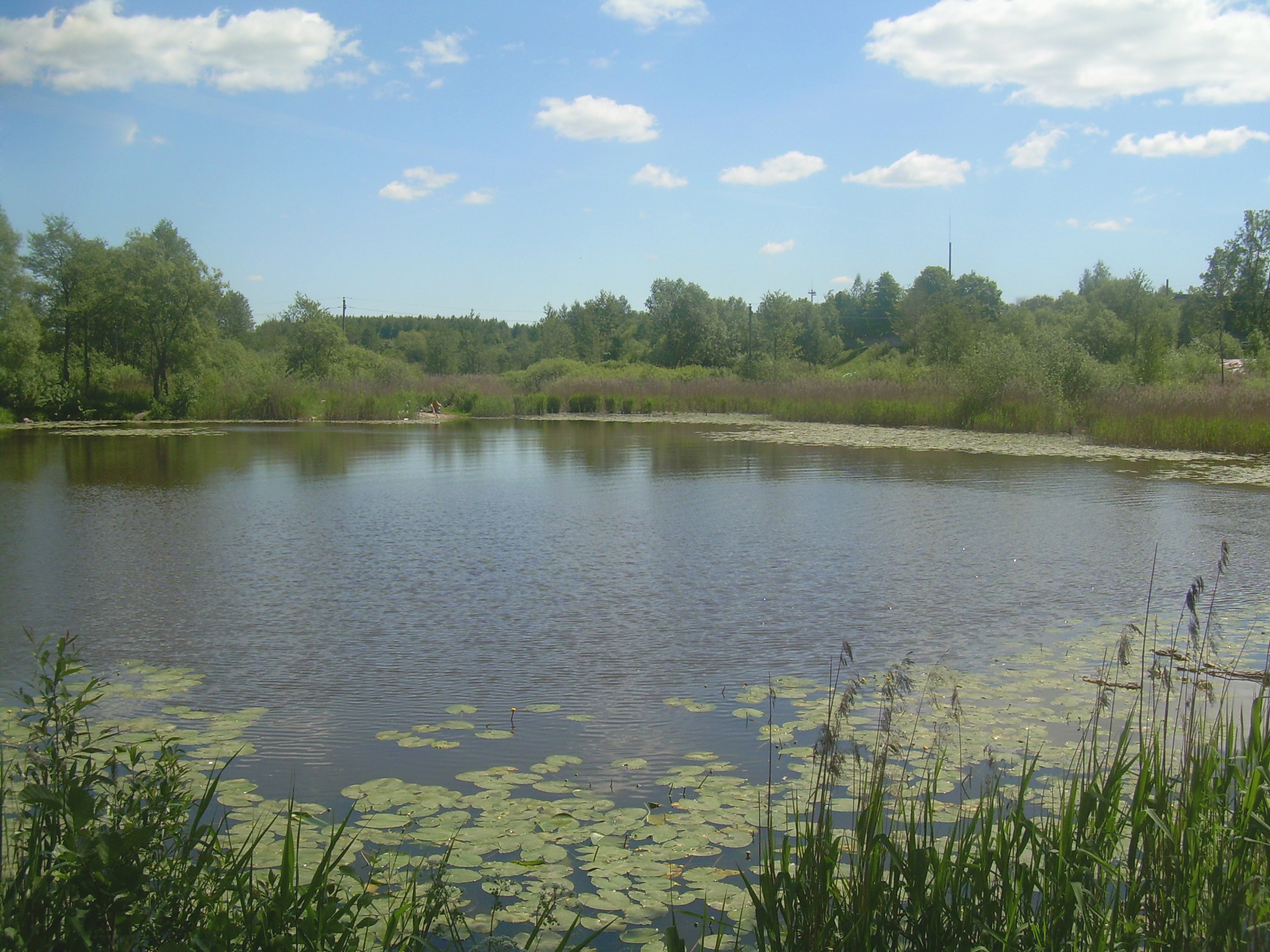 vakar pats fotografavau,čia yra ežeras skaidiškese.